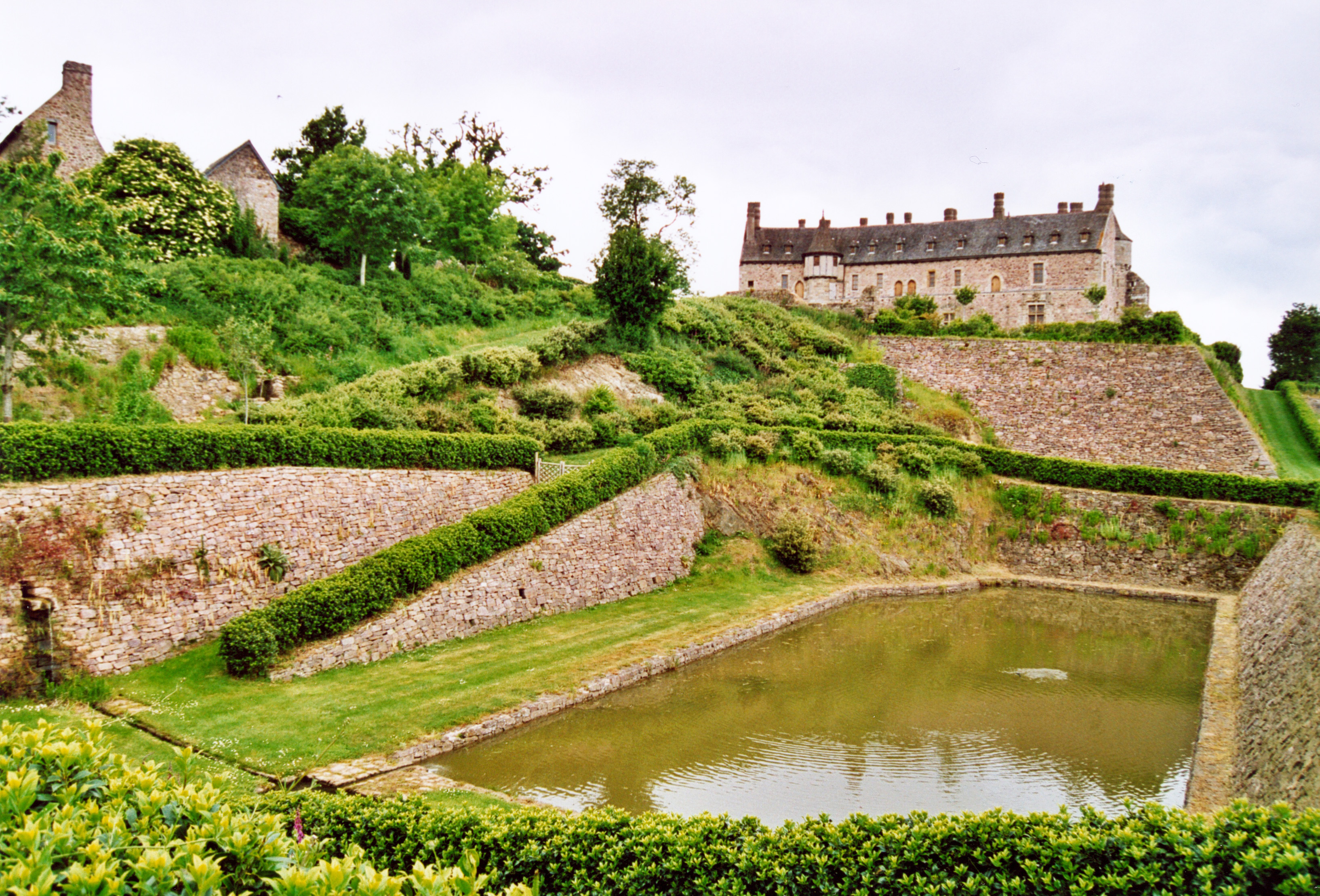 France Bretagne Côtes d'Armor Château de la Roche-Jagu Photographie prise par GIRAUD Patrick